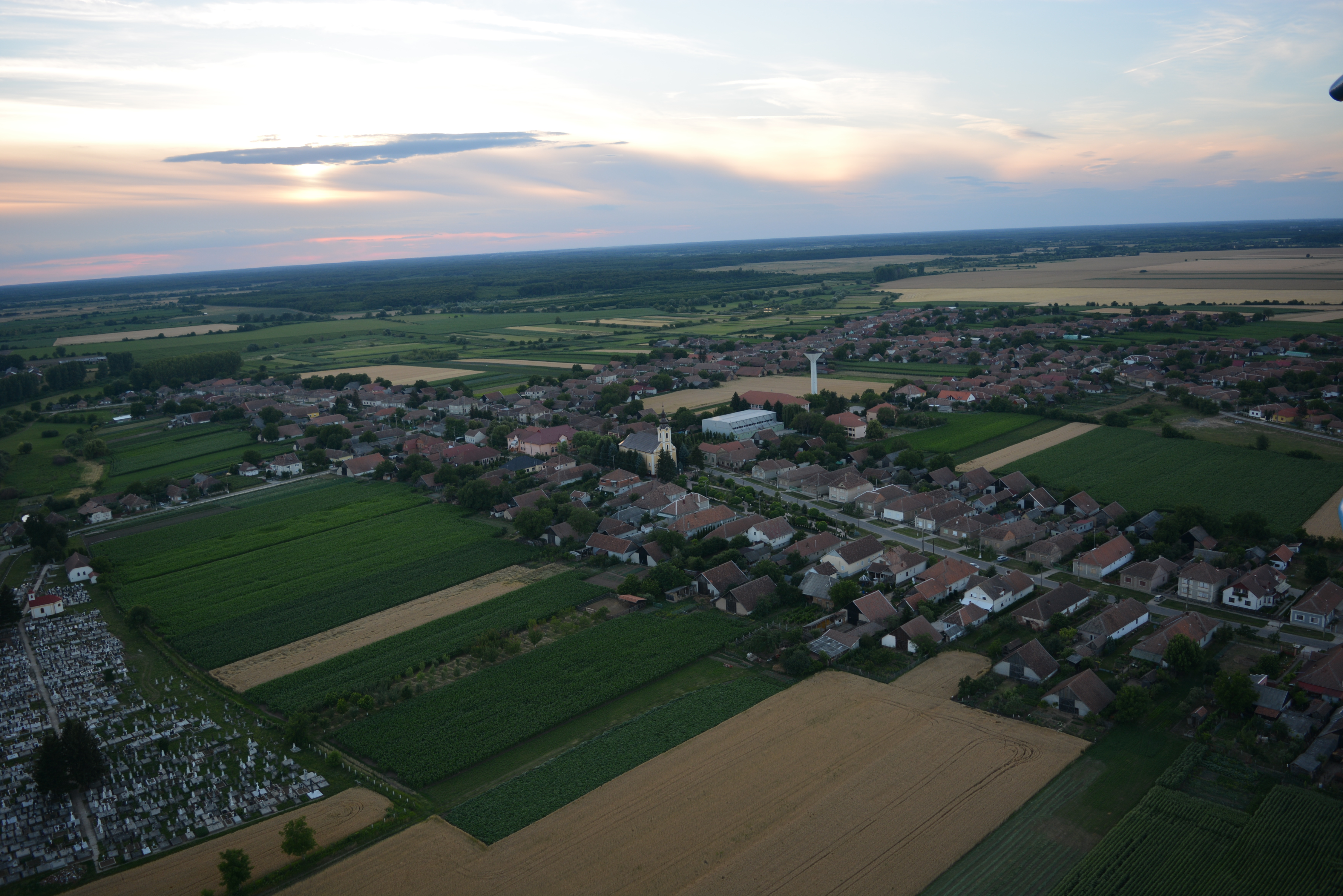 Mezőfény a magasból